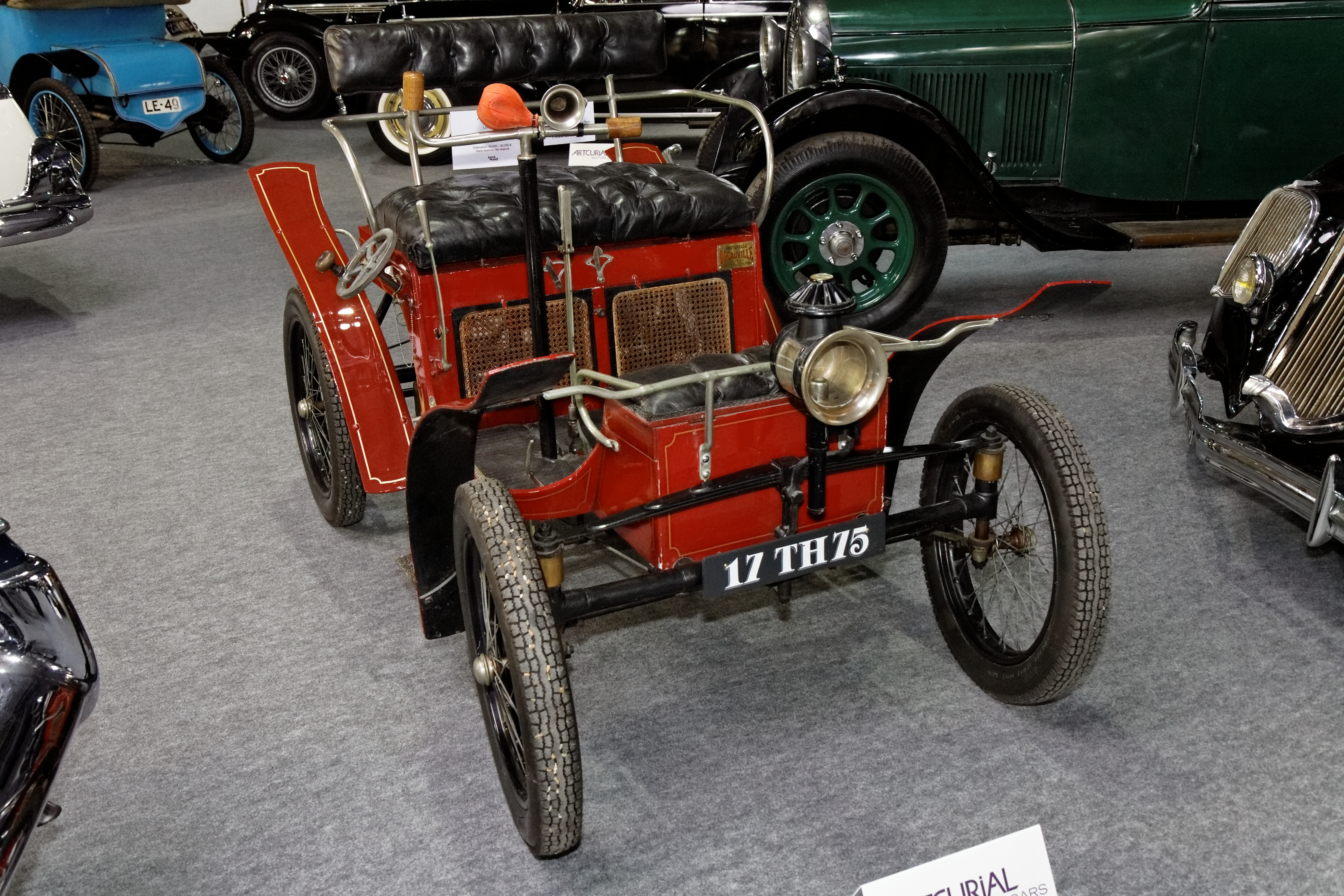 Decauville voiturette